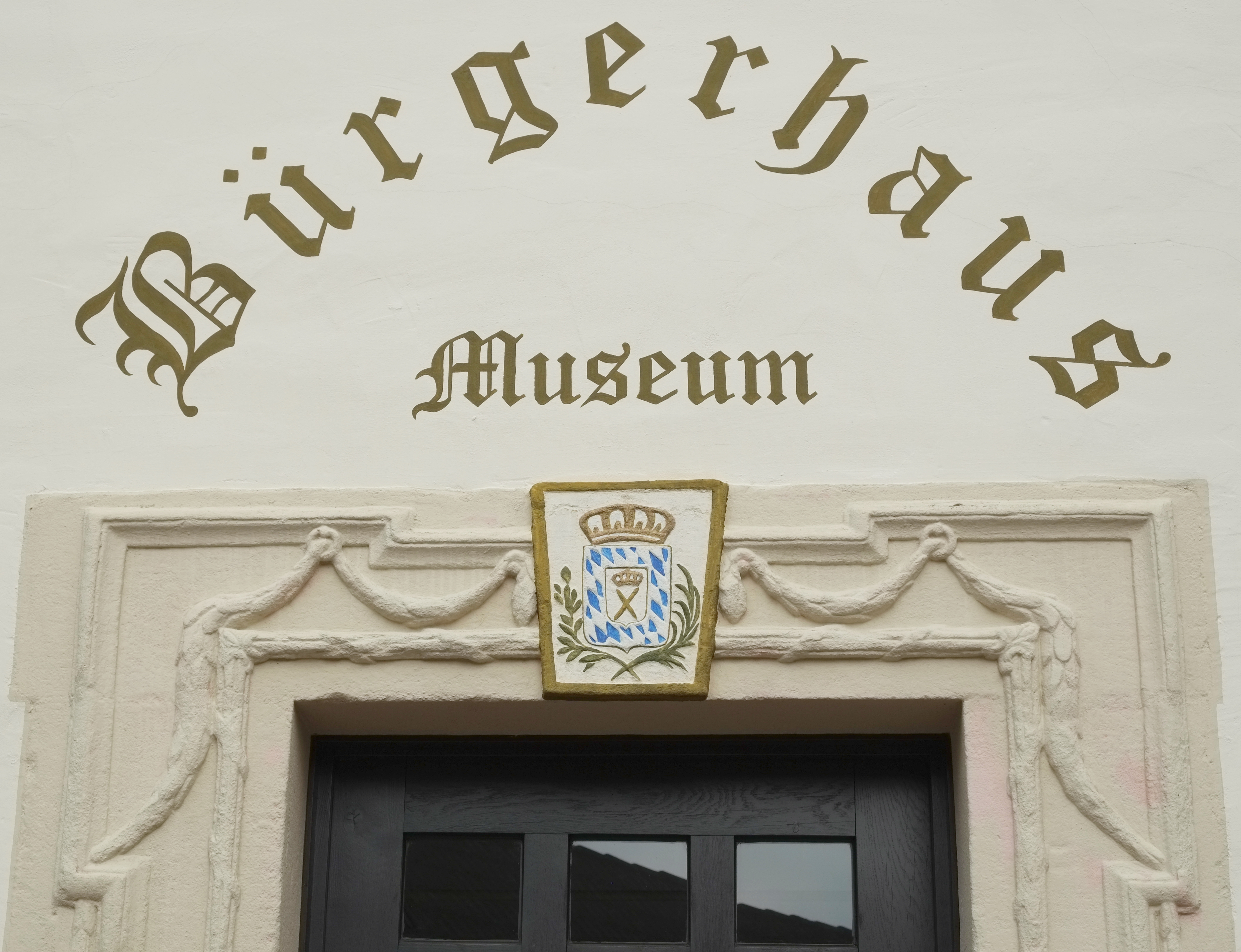 Schloss in Pleinfeld im Landkreis Weißenburg-Gunzenhausen (Bayern/Deutschland)